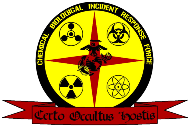 Chemical Biological Incident Response Force insignia.